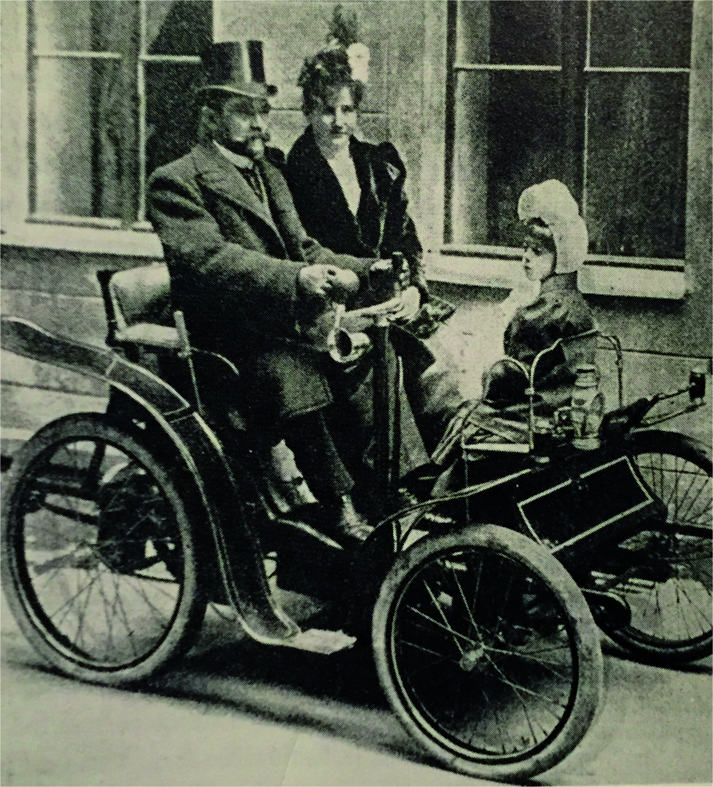 Das Bild entstammt Seper/Brusatti/Krackowitrzer, Österreichische Automobile, S.81